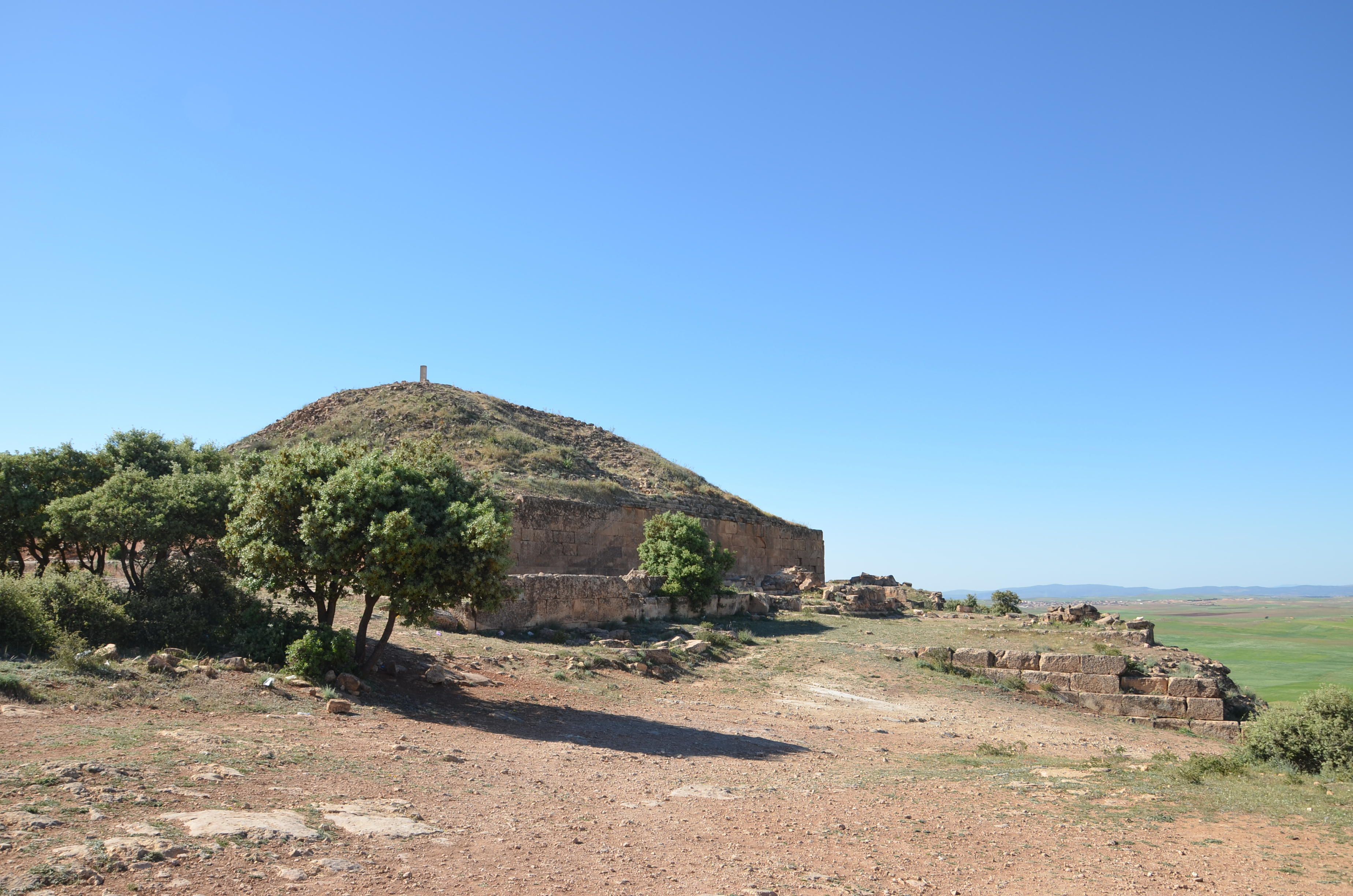 À l'époque qui s'étend de 429 à 671, c'est-à-dire du départ des Romains jusqu'à l'invasion Arabe, il y avait, dans l'Ouest algérien, des roitelets à la tête de principautés. Tels seraient les rois berbères enterrés dans les Djeddars près de Frenda et dont la capitale parait avoir été Tsinouna